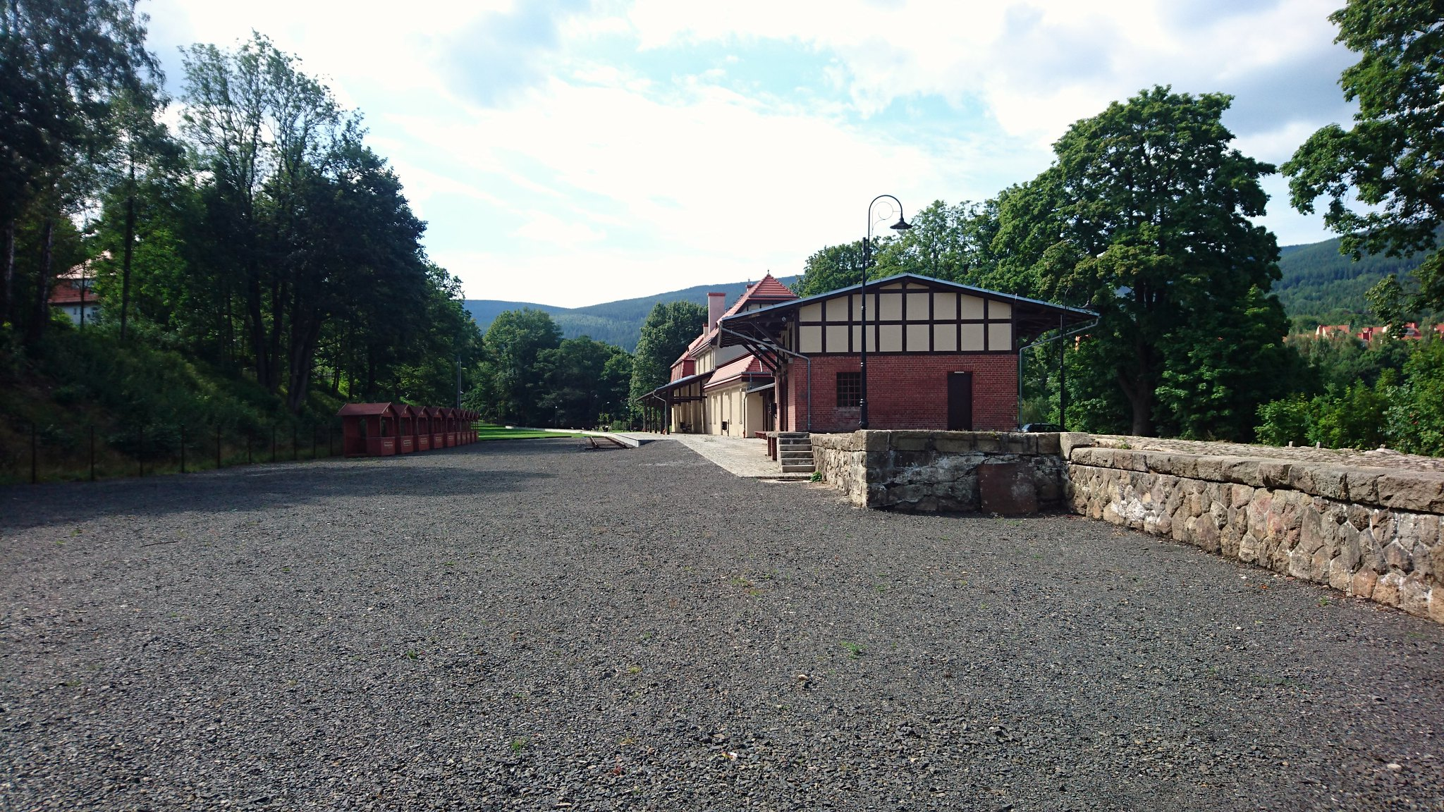 Bahnhof Bad Flinsberg am 09.08.2019.